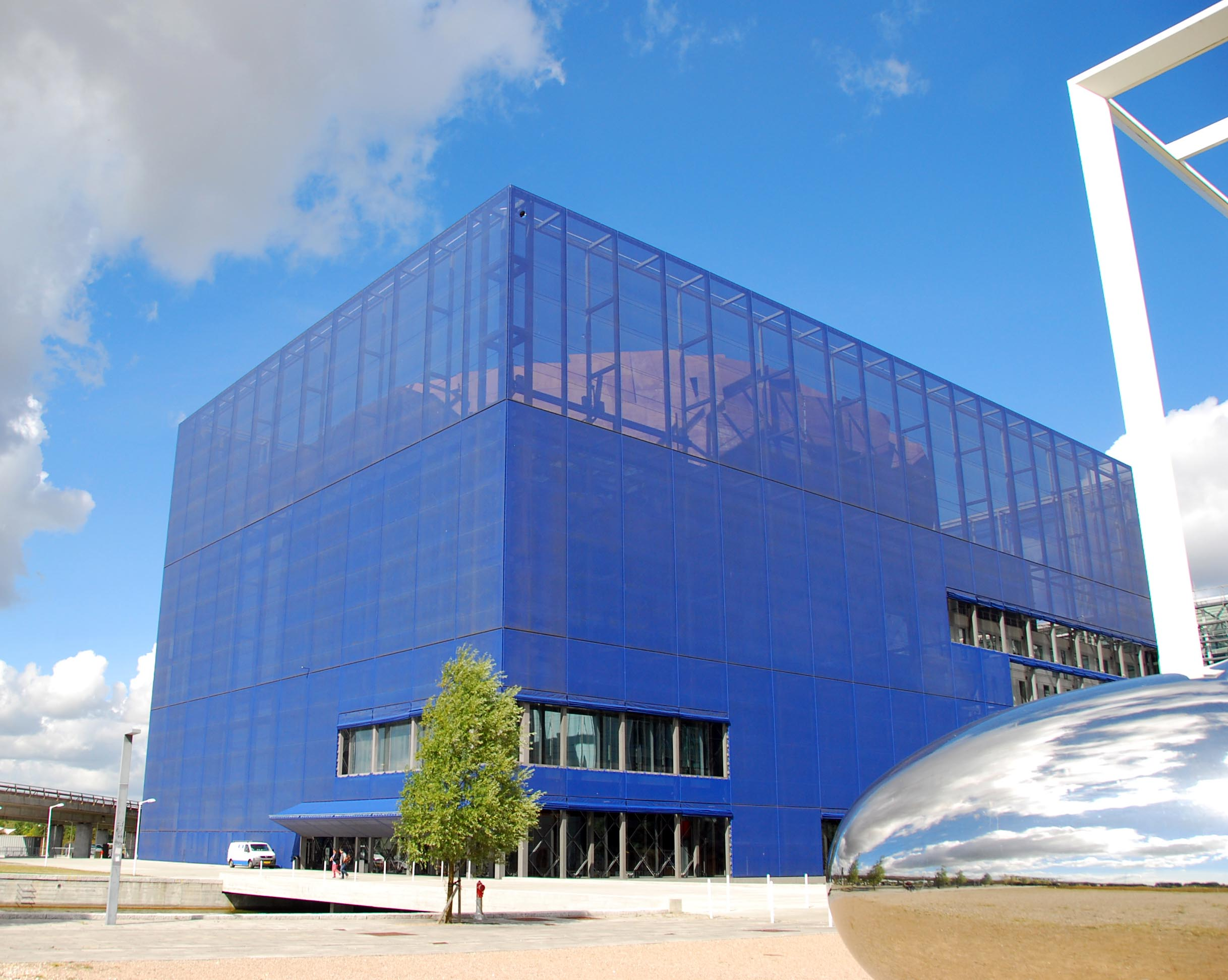 Copenhagen Concert Hall in Copenhagen, Denmark